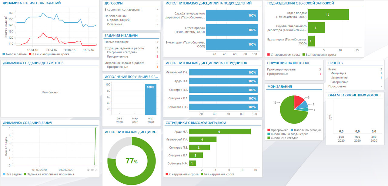 Виджеты для мониторинга задач и процессов в веб-клиенте Directum